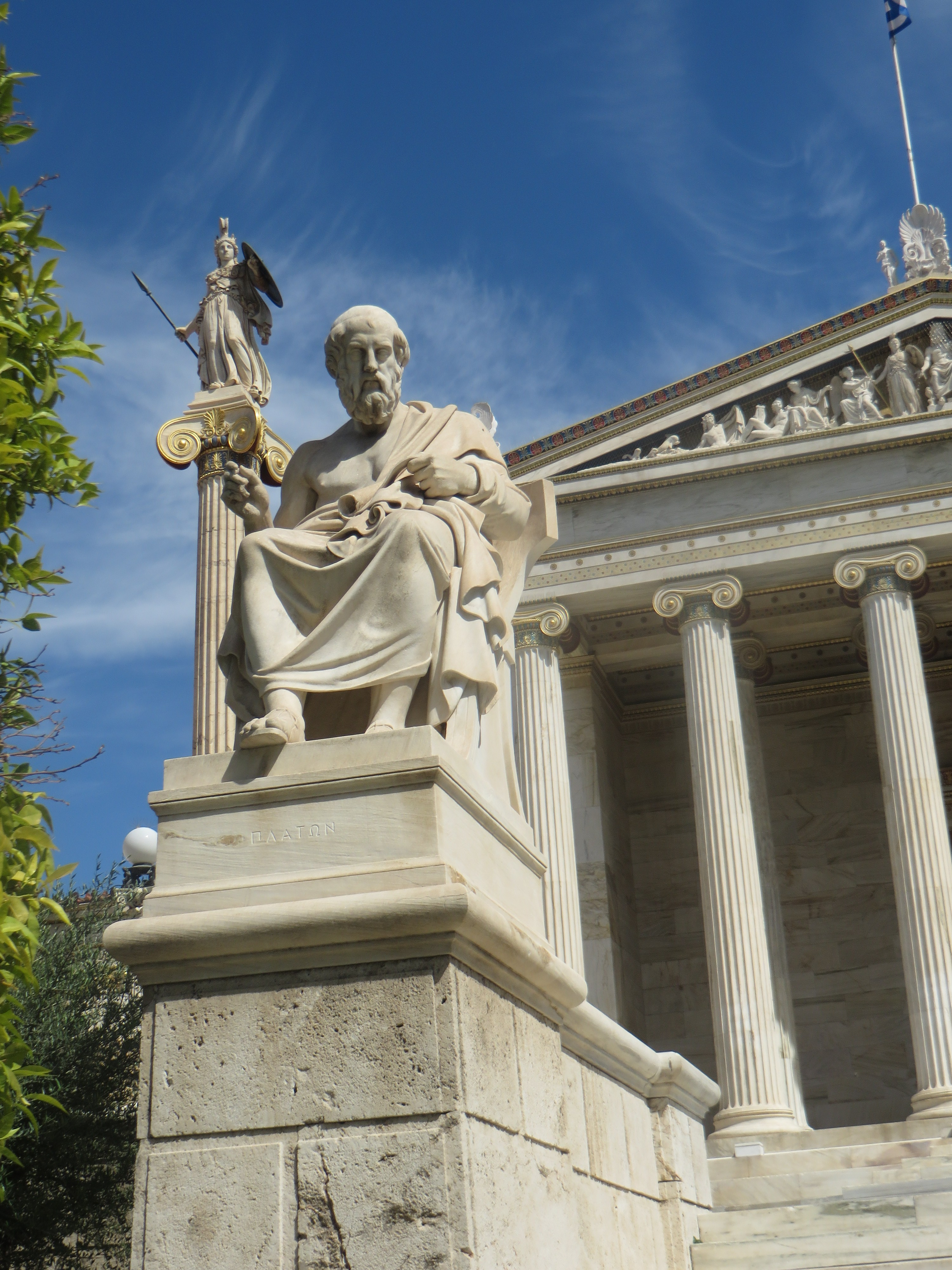 Ακαδημία Αθηνών«Μέγαρο Ακαδημίας Αθηνών»